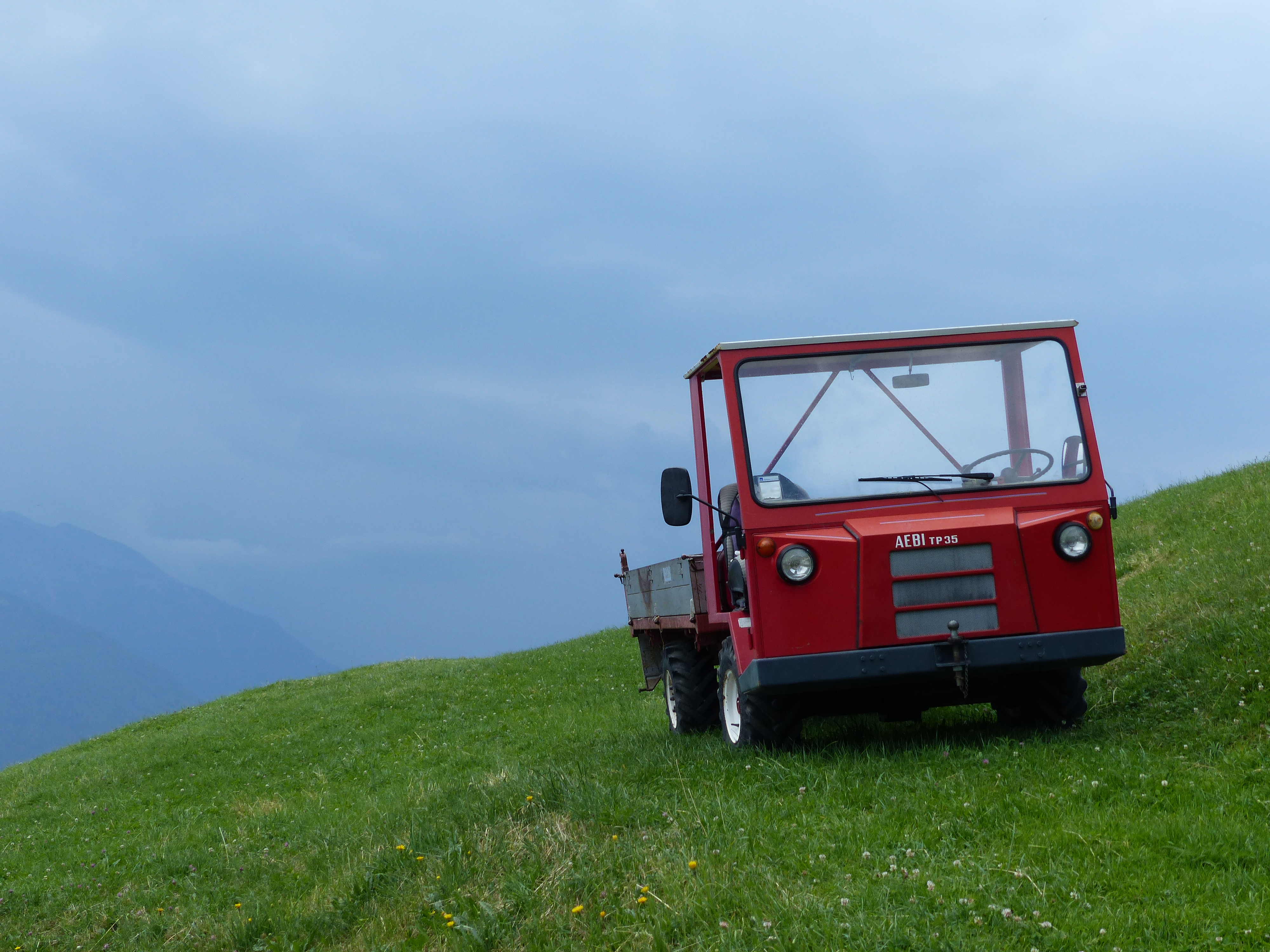 Aebi TP 35 bei St. Martin im Kofel